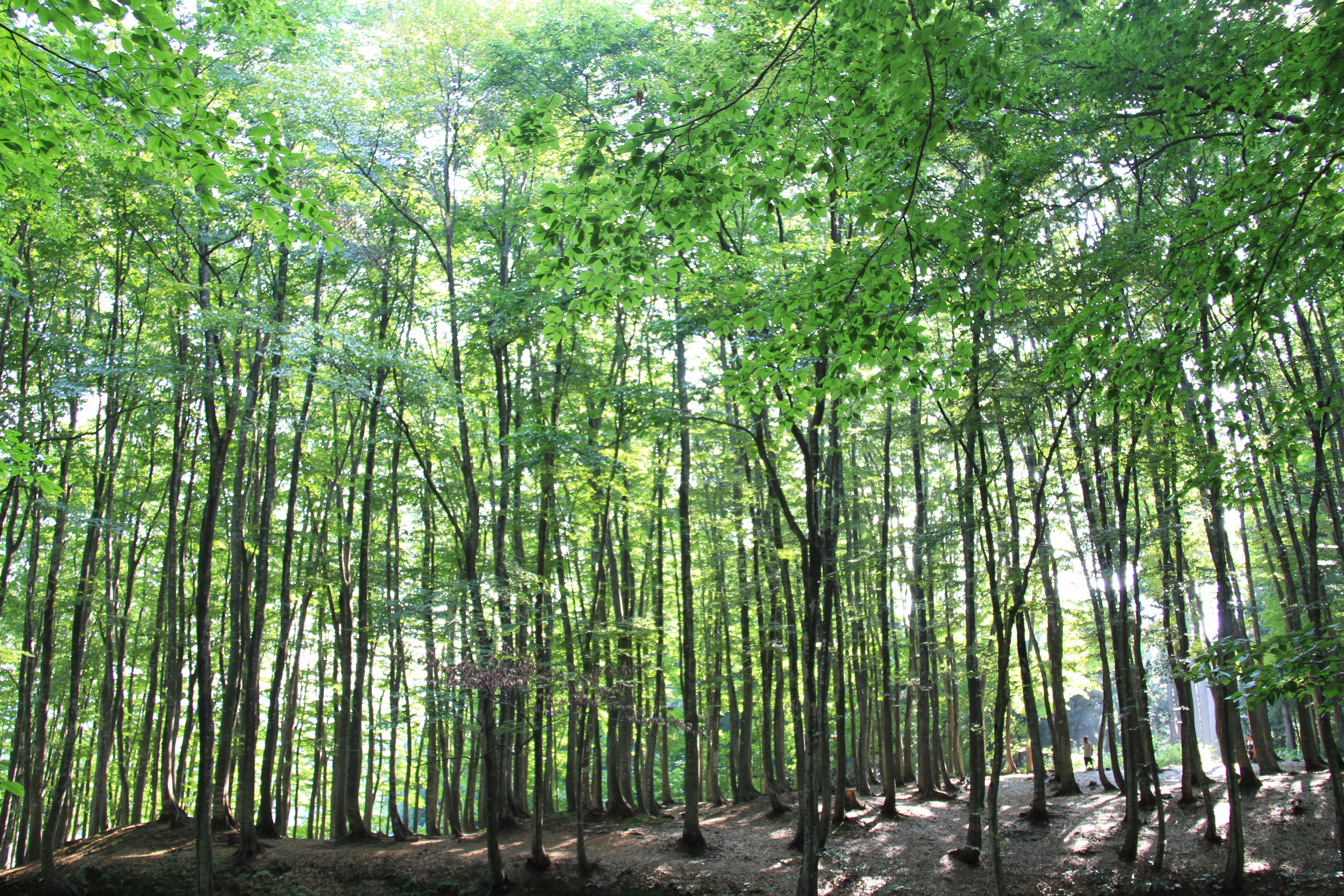 Matsunoyamamatsuguchi, Tokamachi, Niigata Prefecture 942-1411, Japan